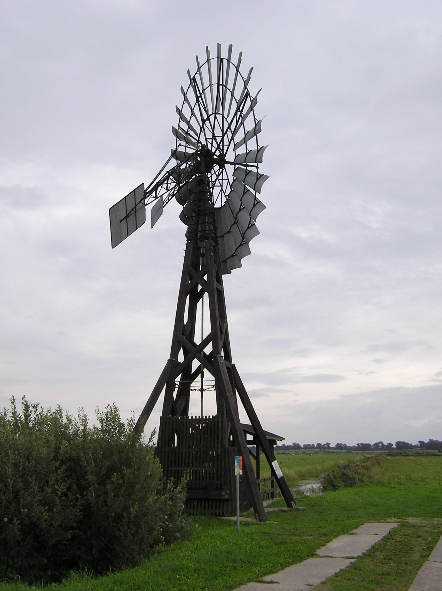 Windkraftschöpfrad im Thurbruch